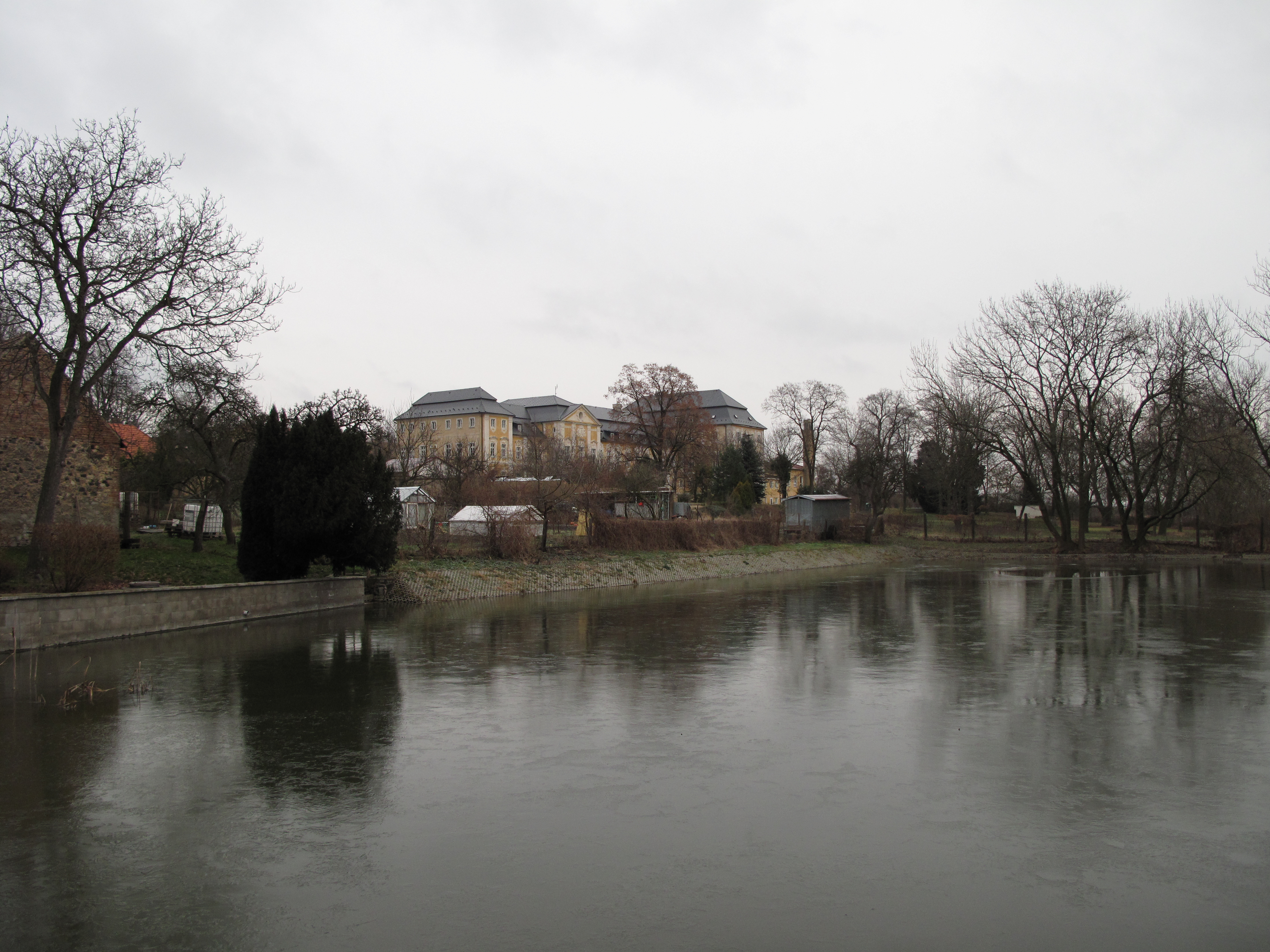 Rybník v Dlažkovicích. Okres Litoměřice, Česká republika.